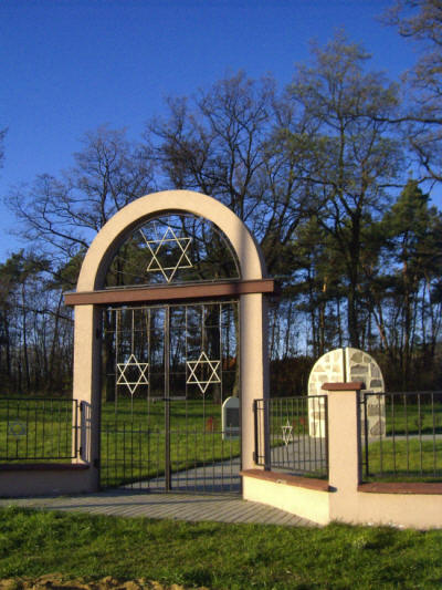 Cmentarz żydowskie w Turku po renowacji (2003)